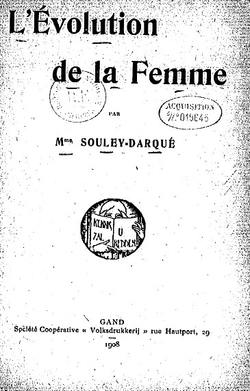 Couverture de l'édition originale L'Evolution de le Femme - Mme Souley-darqué 1908 Fon Gallica